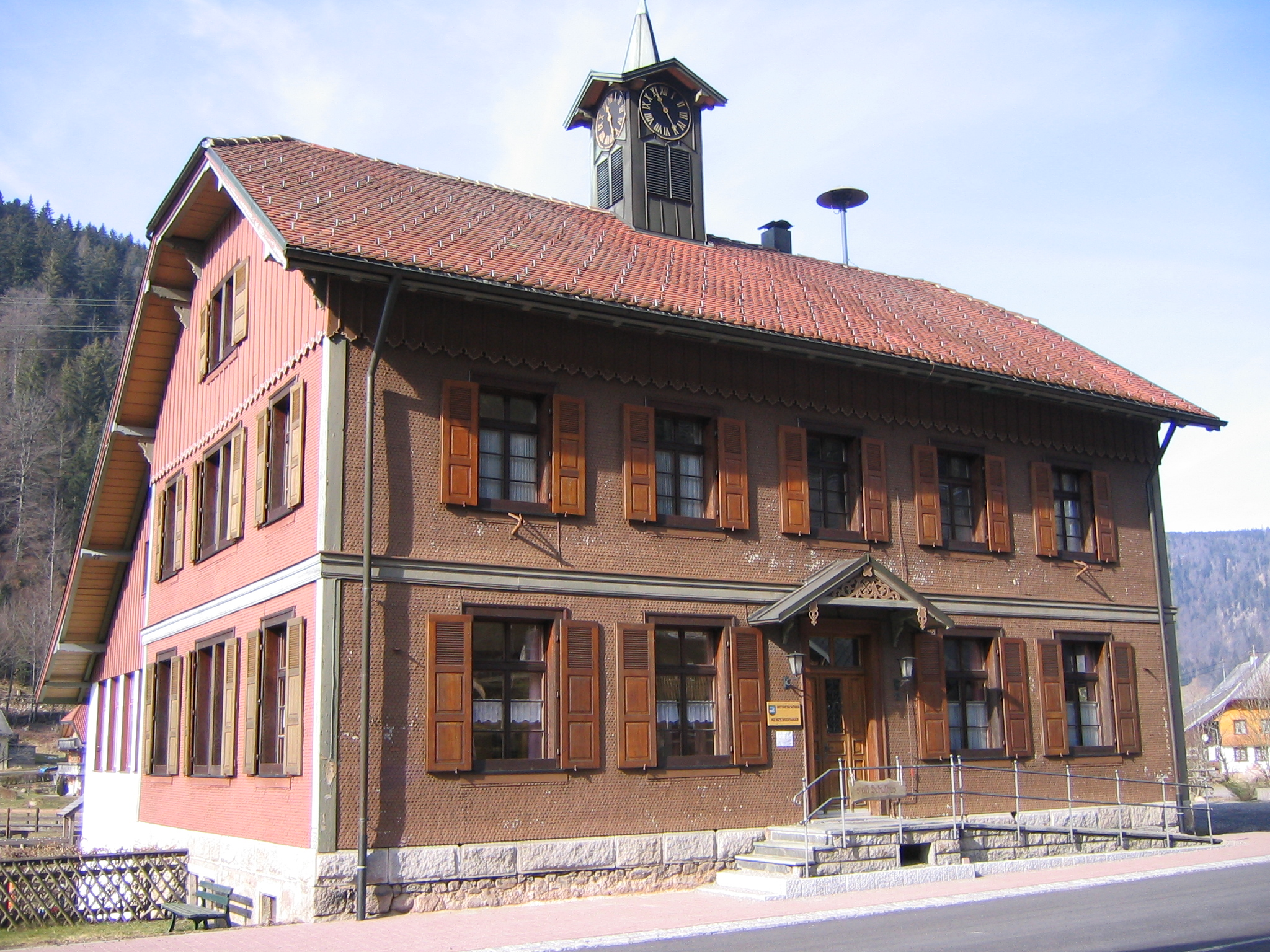 Ortsverwaltung im ehemaligen Schulhaus von Menzenschwand